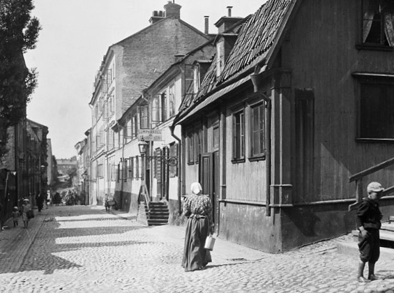 En kvinna går Tavastgatan västerut från Timmermansgatan. T.h. Tavastgatan 30-34. Tavastgatan 32, lumpaffären, revs 1910